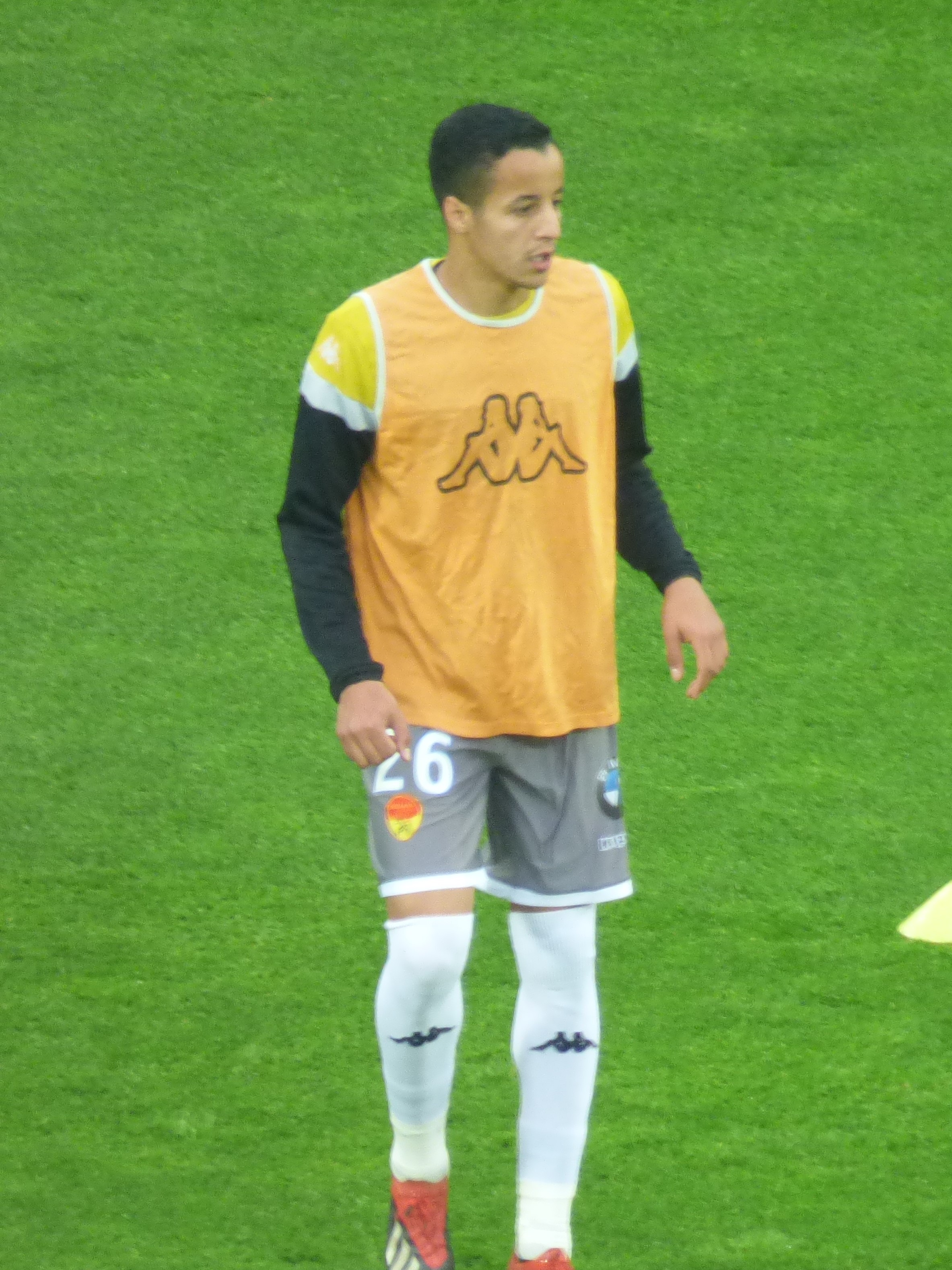 Hicham Benkaïd avant le match RC Lens / US Orléans, le 17 mai 2019, comptant pour la 38ème journée du championnat de France de football de Ligue 2 2018-2019, au Stade Bollaert-Delelis.